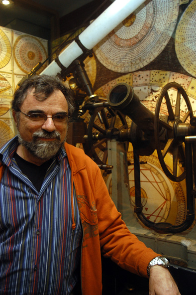 Daniel Altschuler delante de un círculo meridiano semifijo Mailhat (fabricado en 1914 por F. Mouronval), durante una estancia en el Observatorio Astronómico de la Universidad de Valencia, España.